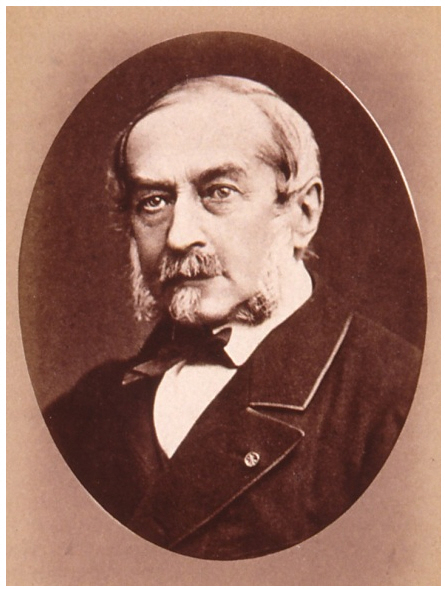 Porträt von Michel Auguste Graeff, veröffentlicht 1888, Format 22,5 x 14 cm / 14 x 10 cm